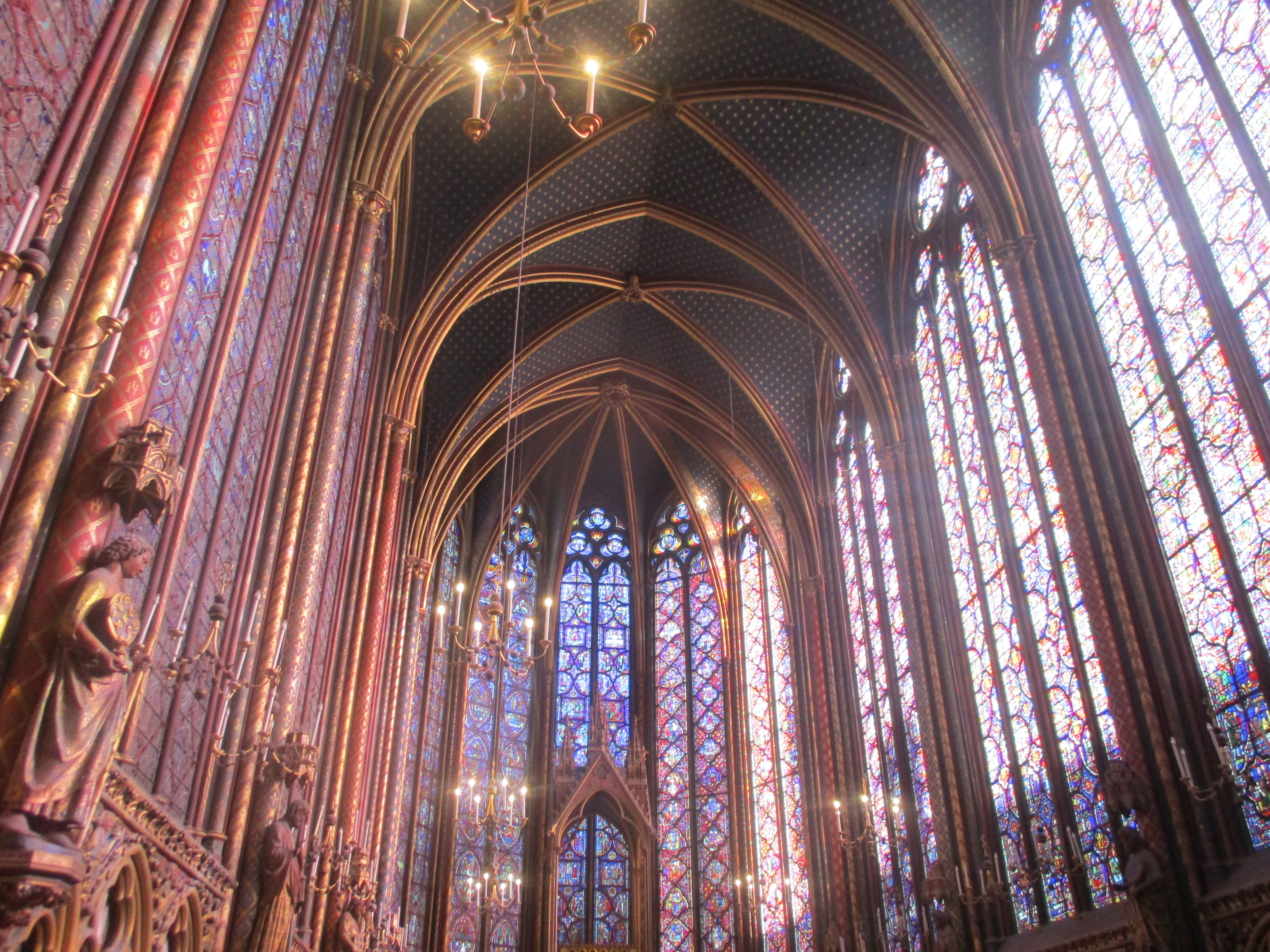 Intérieur de la Sainte-Chapelle.